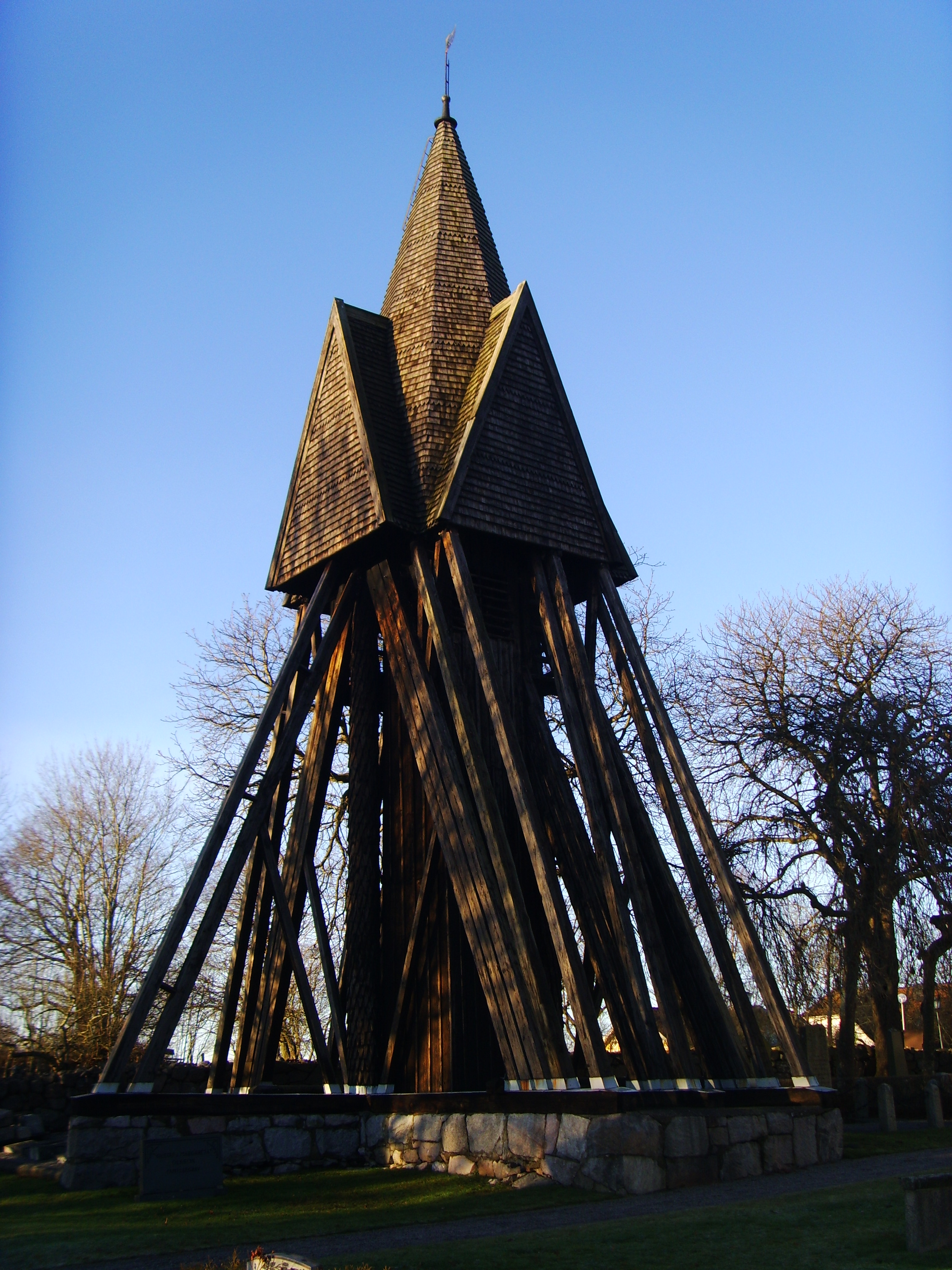 Kullerstads kyrka i Linköpings stift.